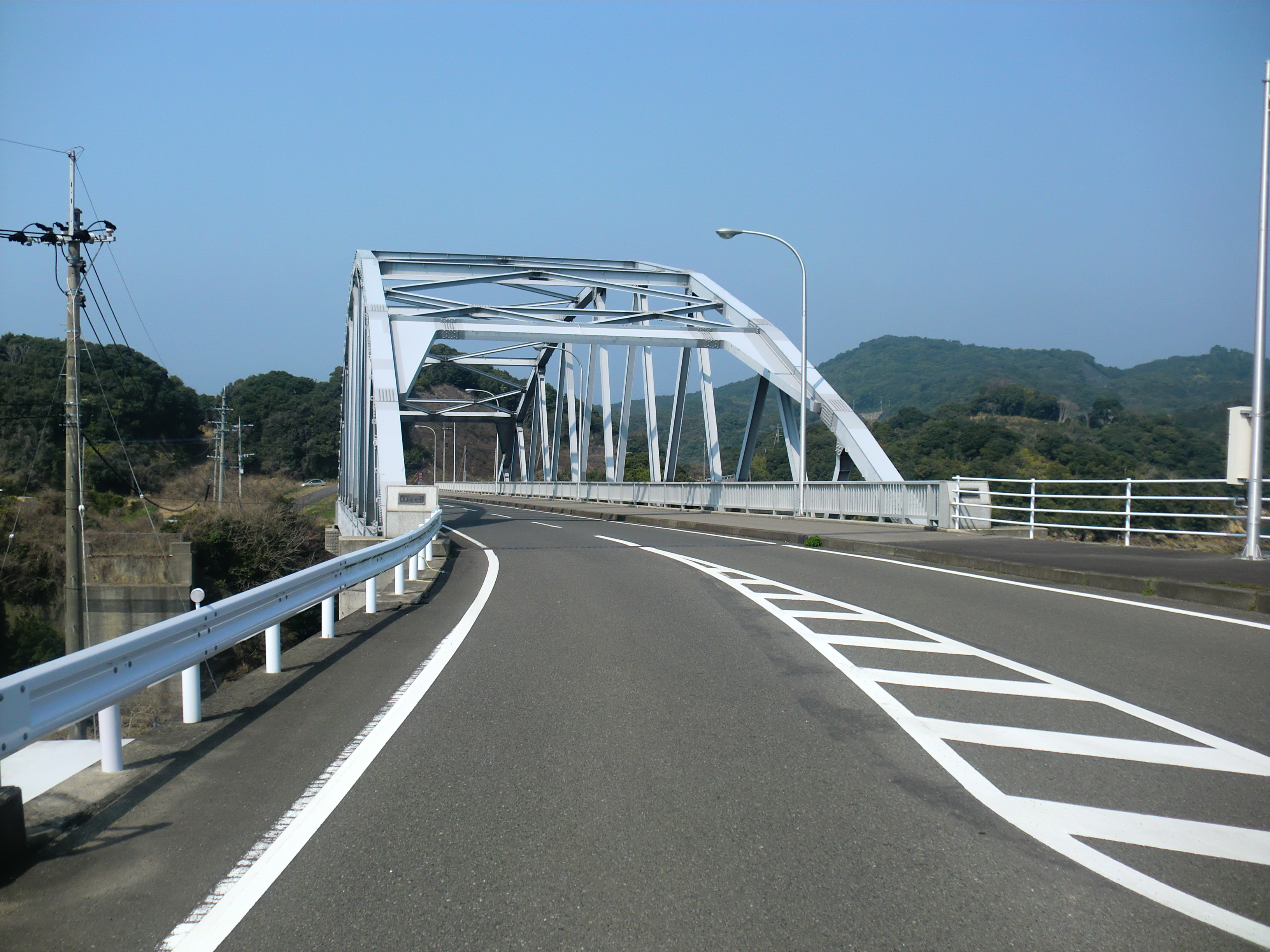 長島と諸浦島に架かる乳ノ瀬（ちちのせ）橋。長島側から撮影。